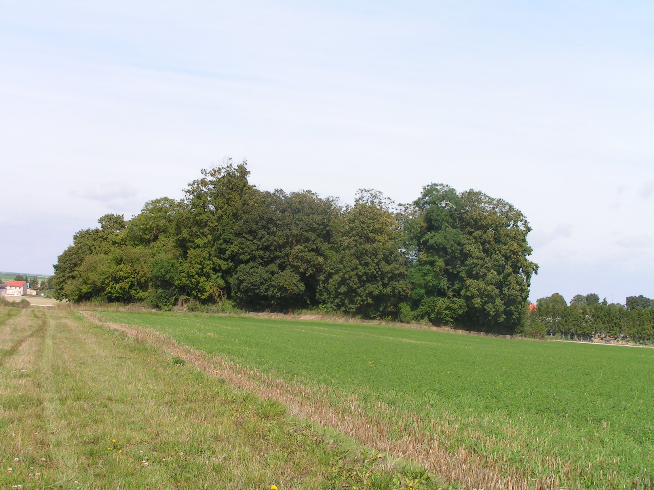 Tombeau de Théodoric (Classé)